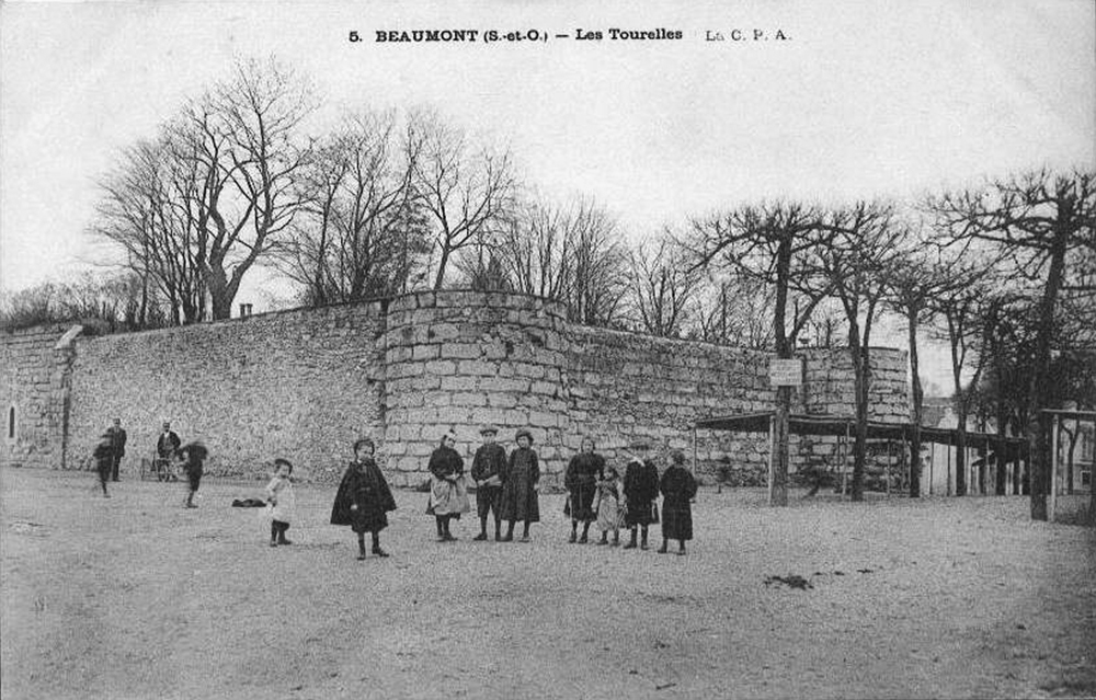 Château de Beaumont-sur-Oise (Val-d'Oise) vers 1900 lorsque le département de Seine-et-Oise (S.-et-O.) existait encore. De gauche à droite, on observe un bout du donjon, un tronçon de boulevard d'artillerie, une première tourelle, une portion de courtine et une deuxième tourelle. La base du donjon, des tourelles, etc. , est enterrée / Beaumont-sur-Oise castle in the Val-d'Oise department c. 1900 (at the time the town was part of the former Seine-et-Oise department). From left to right, one can see part of the stone keep, a section of an earth bulwark, and two turrets linked by a curtain wall. The original base level of the keep and towers lies several metres underneath the ground level.